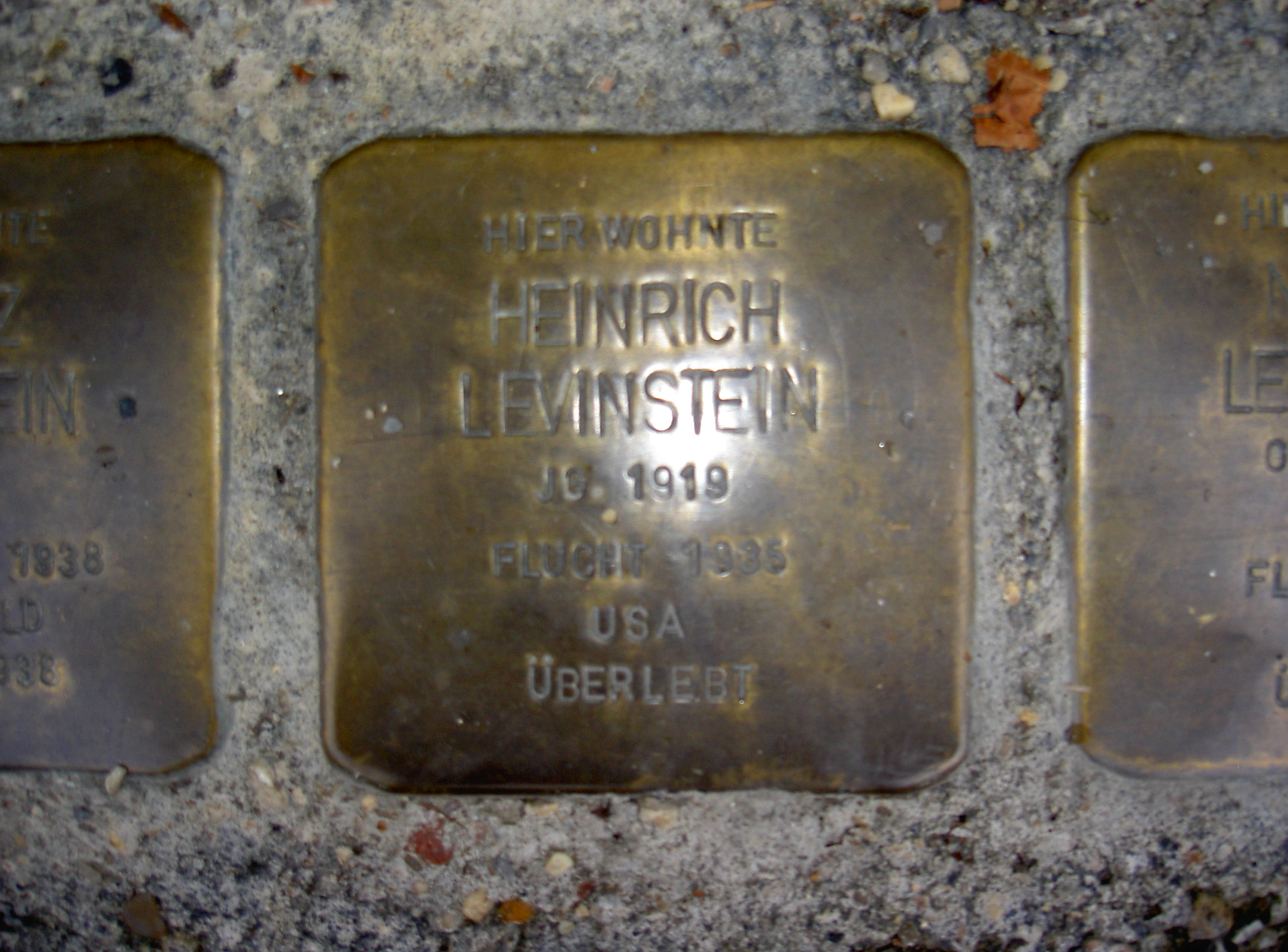 Stolperstein in Themar Levinstein Heinrich